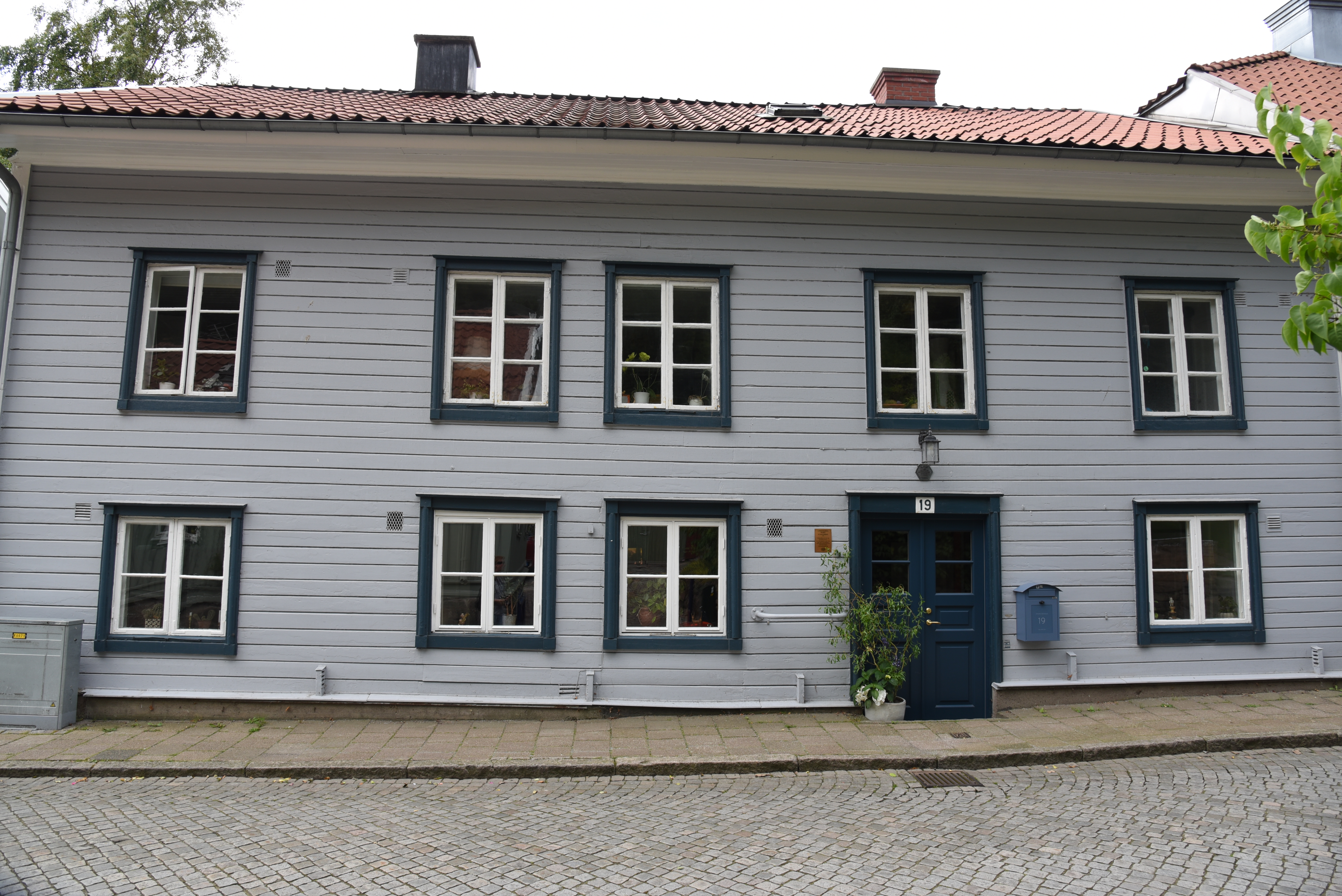 Det byggnadsminnesmärkta Lundholmska huset vid Västra gatan 19, kvarteret Prästgården 13, i Kungälv.